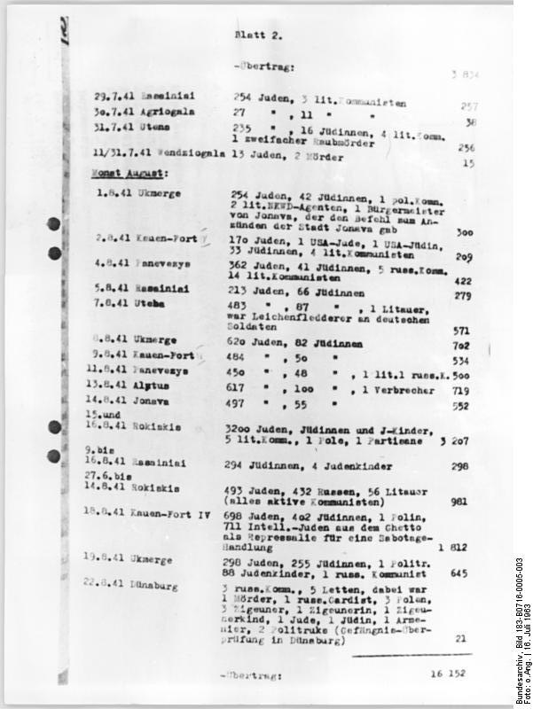 Oberstes Gericht, Globke-Prozess, Beweisstück Zentralbild 16.7.1963 Dokumente über faschistische Greuel aus der UdSSR. UBz: Reproduktion der auszugsweise während des 7. Verhandlungstages des Globke-Prozesses am 15. Juli verlesenen Dokumente über faschistische Greuel in der Sowjetunion. Pedantisch genau zieht hier ein SS-Standartenführer Jäger die grausige Bilanz: "In Litauen gibt es keine Juden mehr." (siehe auch 2 und 4 - 10N)